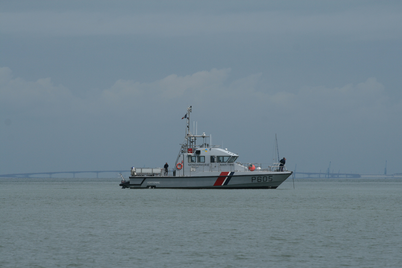 Vedette de la gendarmerie maritime devant le pont de Re